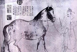 中文（香港）: 李公麟 五馬圖